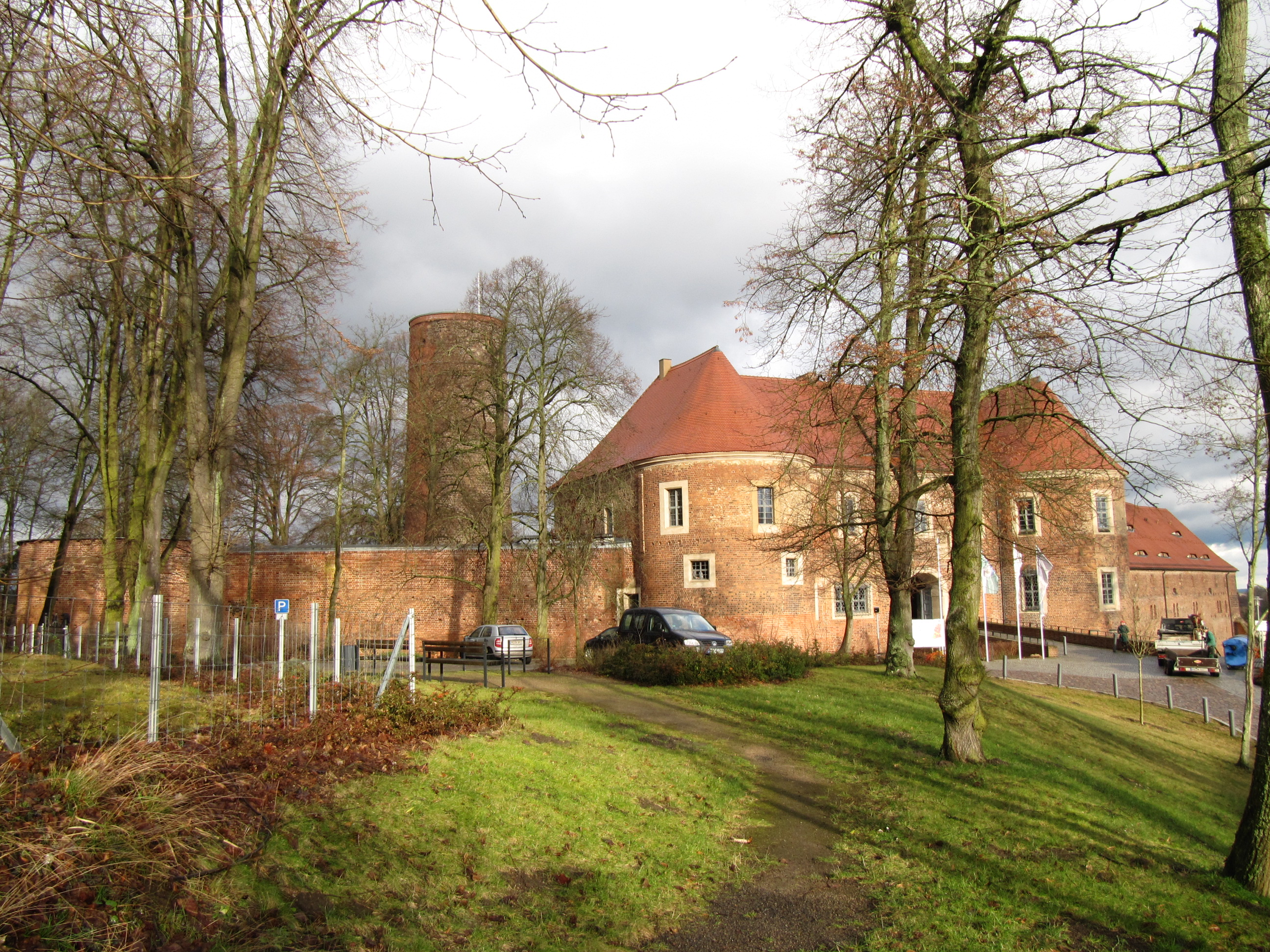 burg eisenhardt von süden